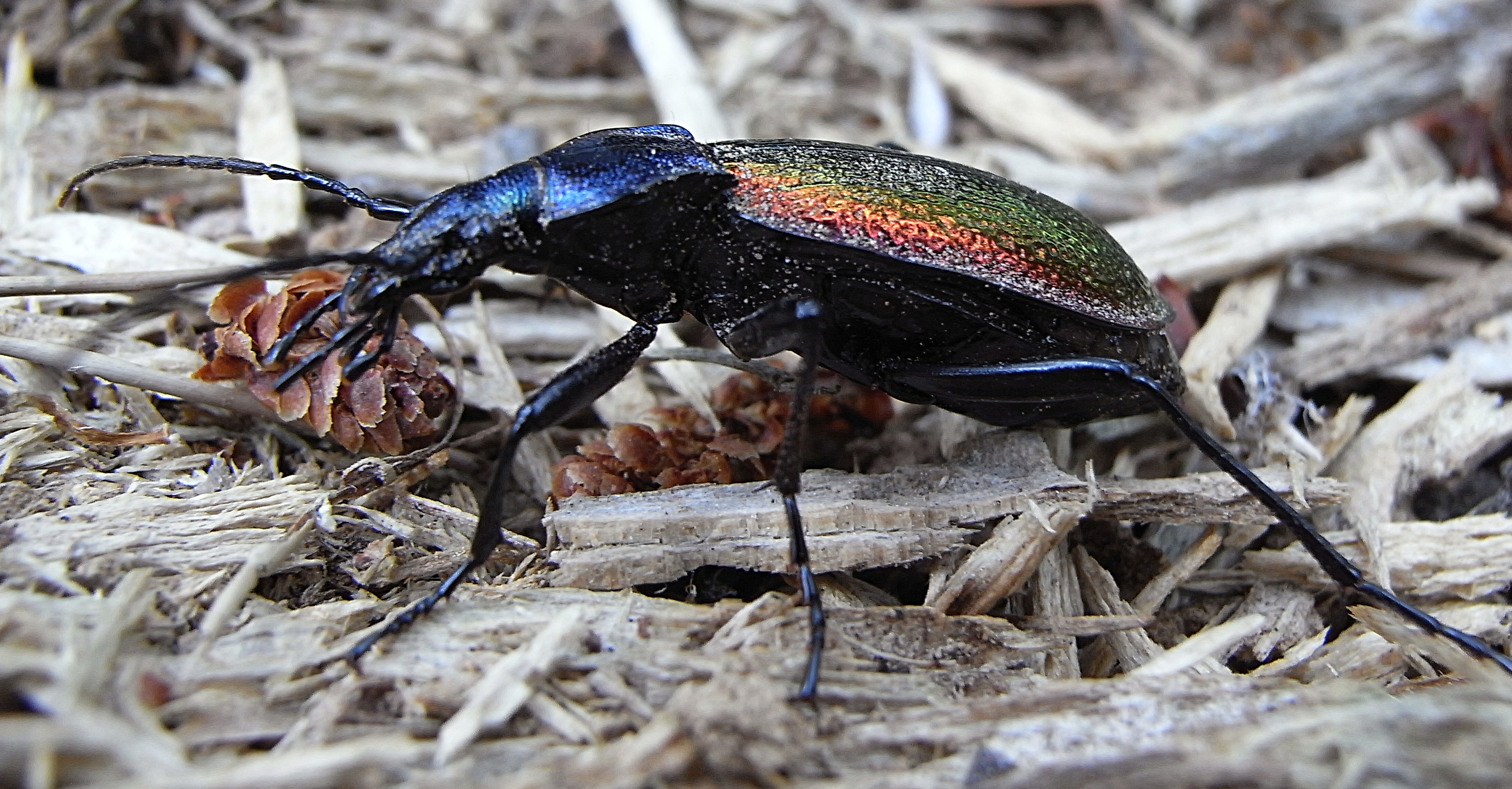 carabus hispanus Ricoh R8